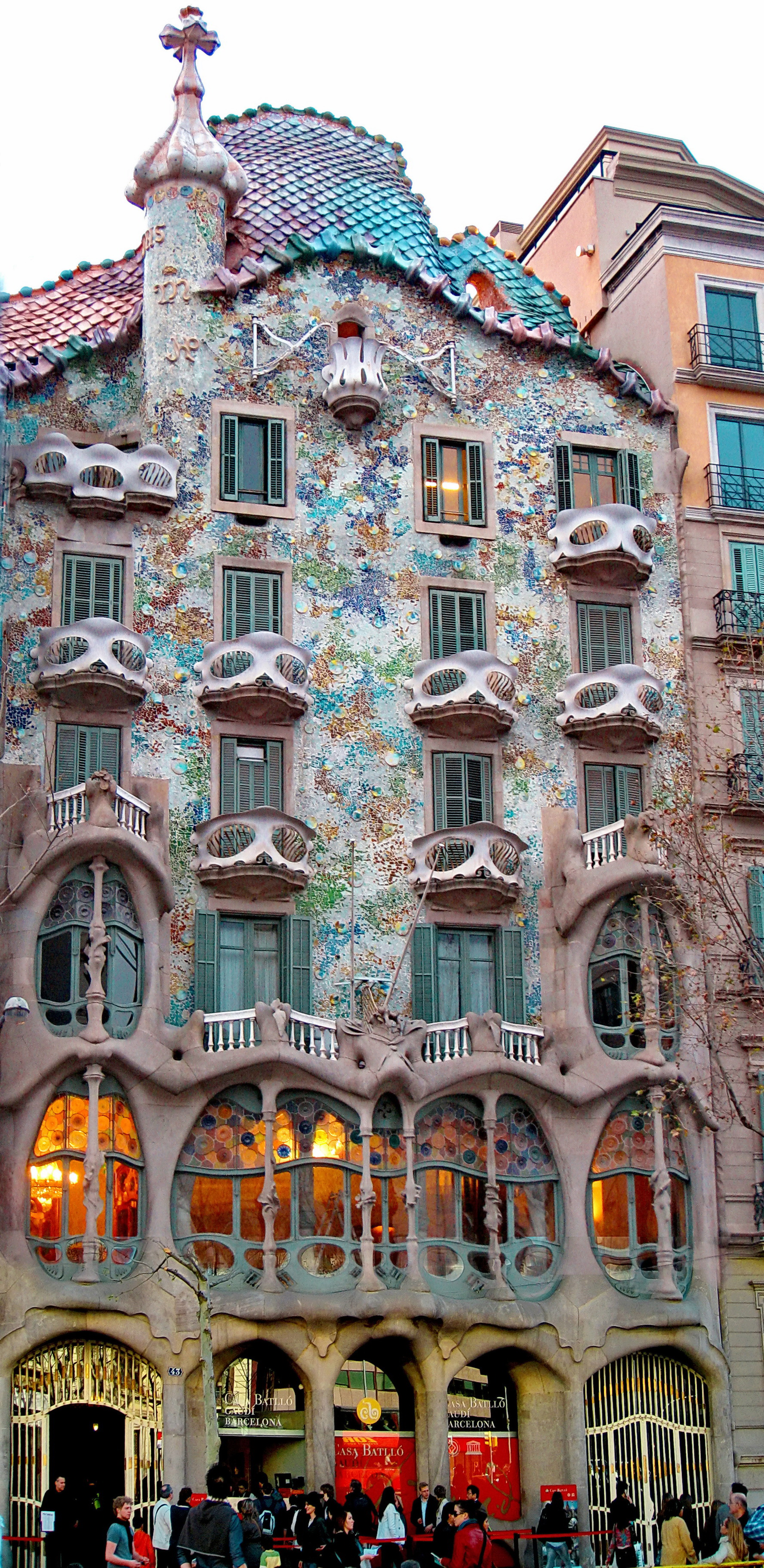 Façana principal de la Casa Batlló (1905-1907), obra d'Antoni Gaudí